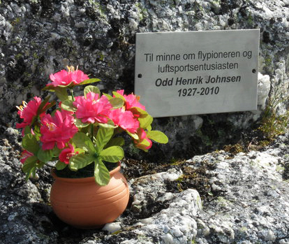 Plankett Odd Henrik Johnsen på Keiservarden.